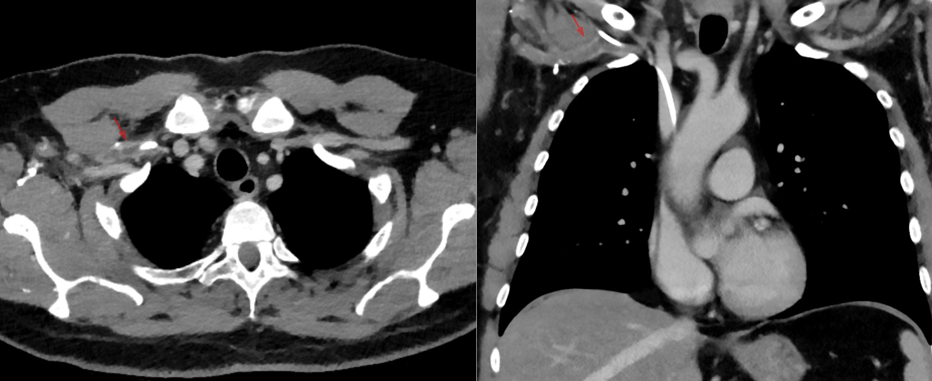 Thrombose in der Vena subclavia rechts bei liegendem Portkatheter hier. Darstellung in der Computertomographie links axial, rechts koronar in der portalvenösen Phase. Der 60-jährige Mann fiel mit einer Schwellung des rechten Armes auf.